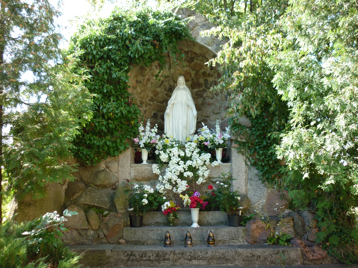 Grota NMP przy kościele parafialnym w Pokrzywnicy